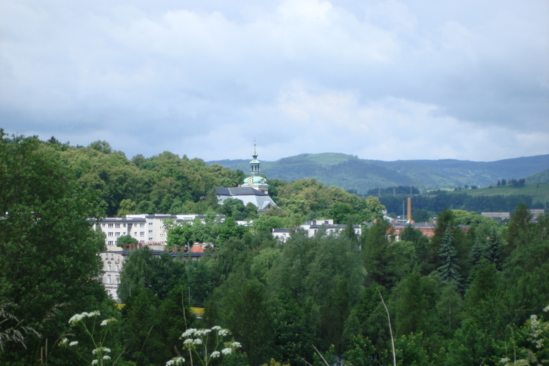 Kamienna Góra, Kościół pw. Matki Bożej Różańcowej